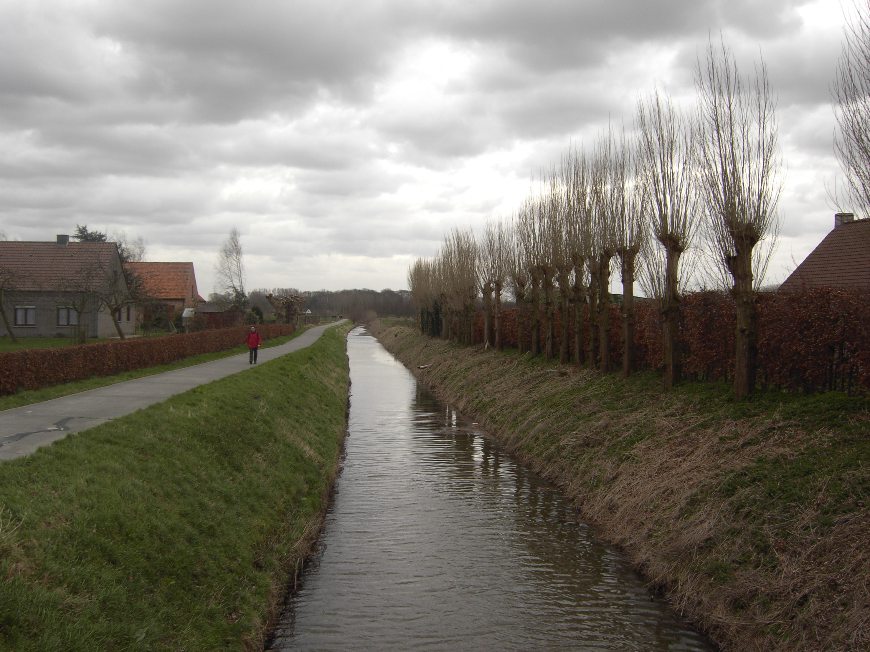 De Lieve te Lovendegem (Belgium)